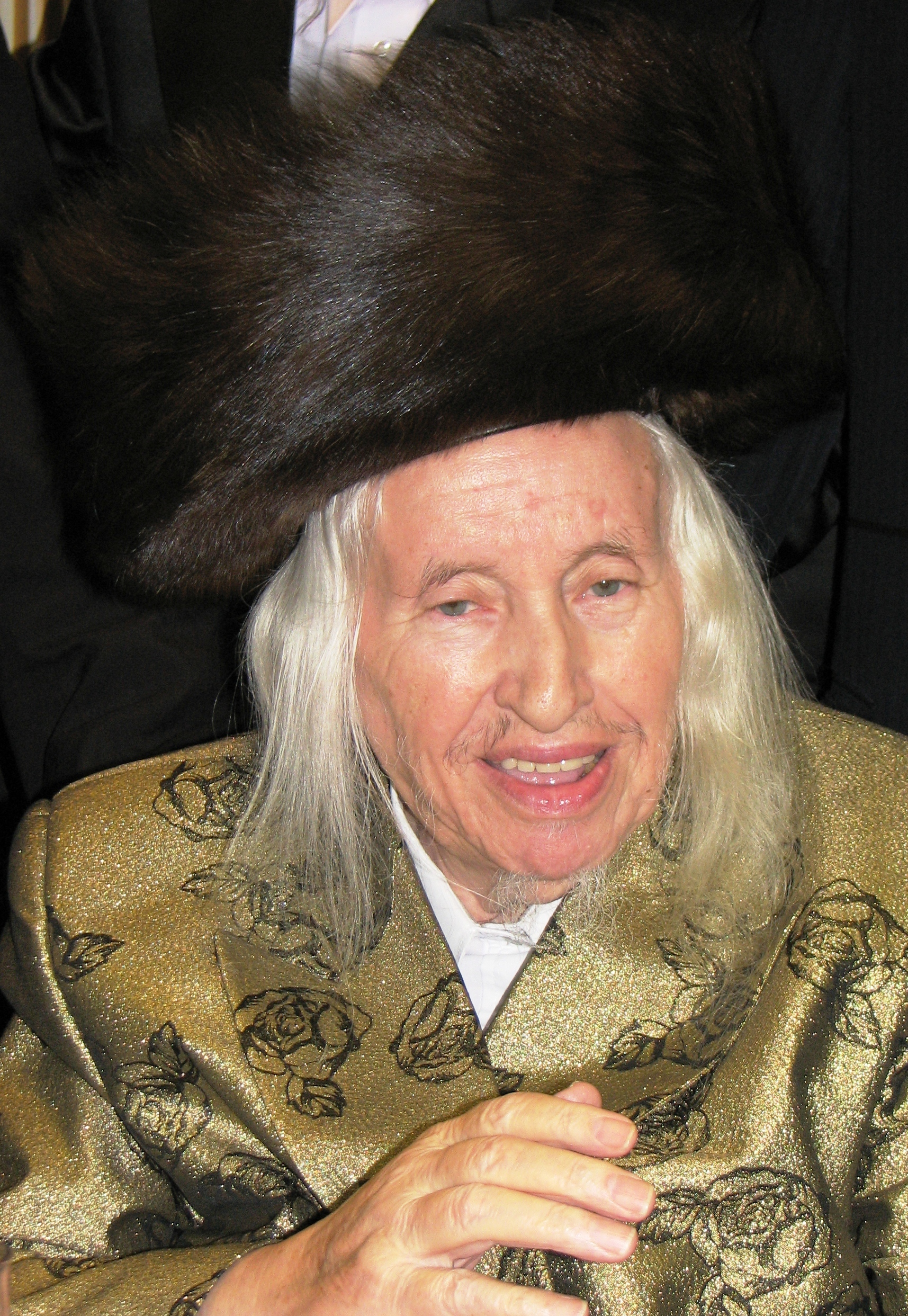 האדמו"ר מקאליב, הרב מנחם מנדל טאוב רישיון נוצר על ידי משתמש:Yeshivatitri